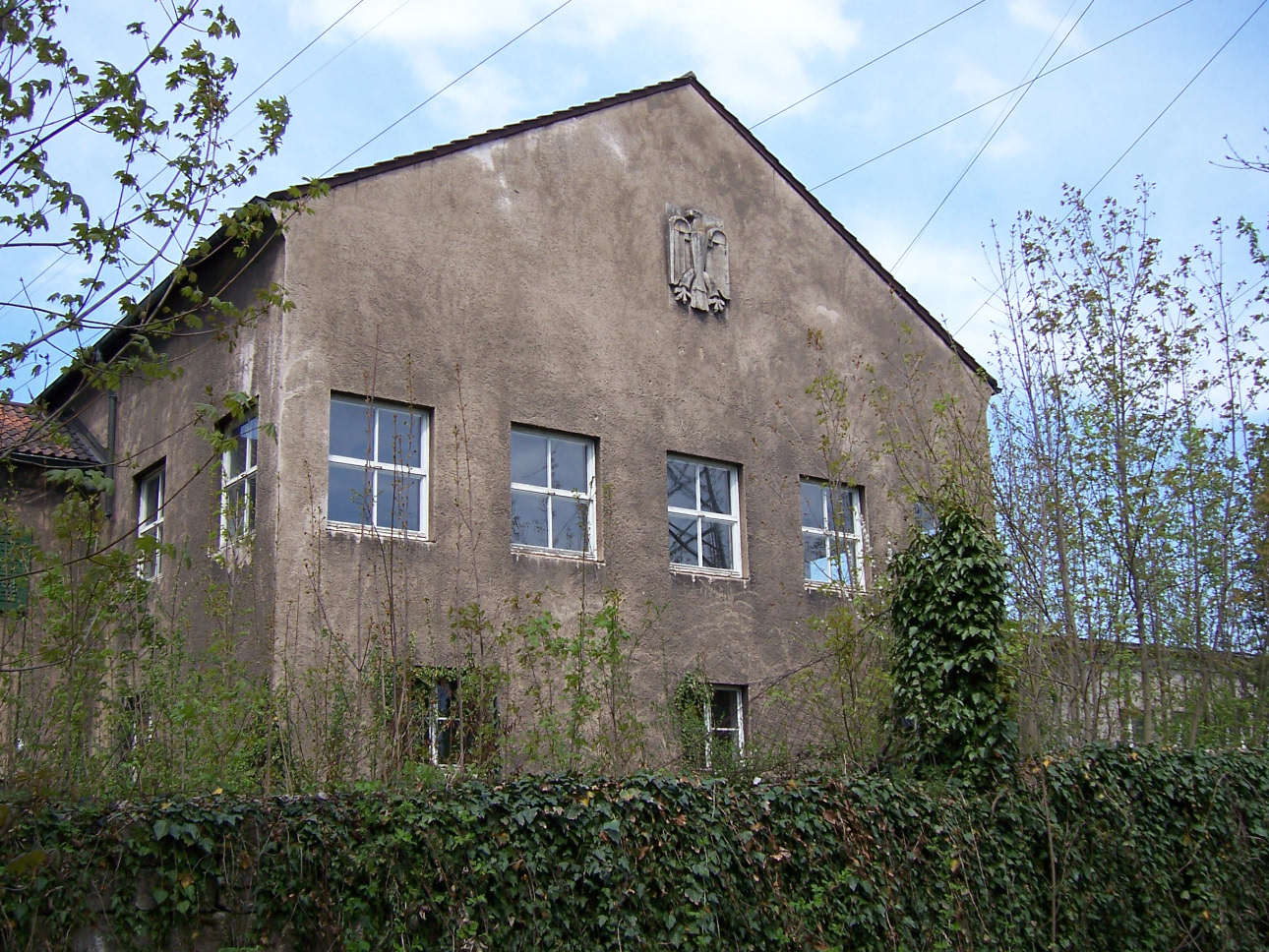 100 0763 Unterwerk Grönhart